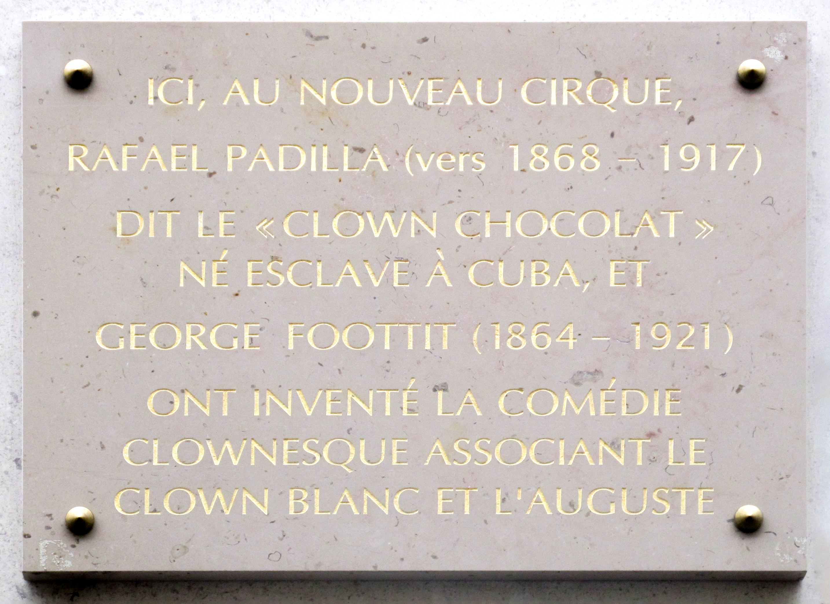 Plaque en hommage au clown Chocolat, 251 de la rue Saint-Honoré (Paris, 1er), sur l'emplacement de l'actuel hôtel Mandarin Oriental Paris.